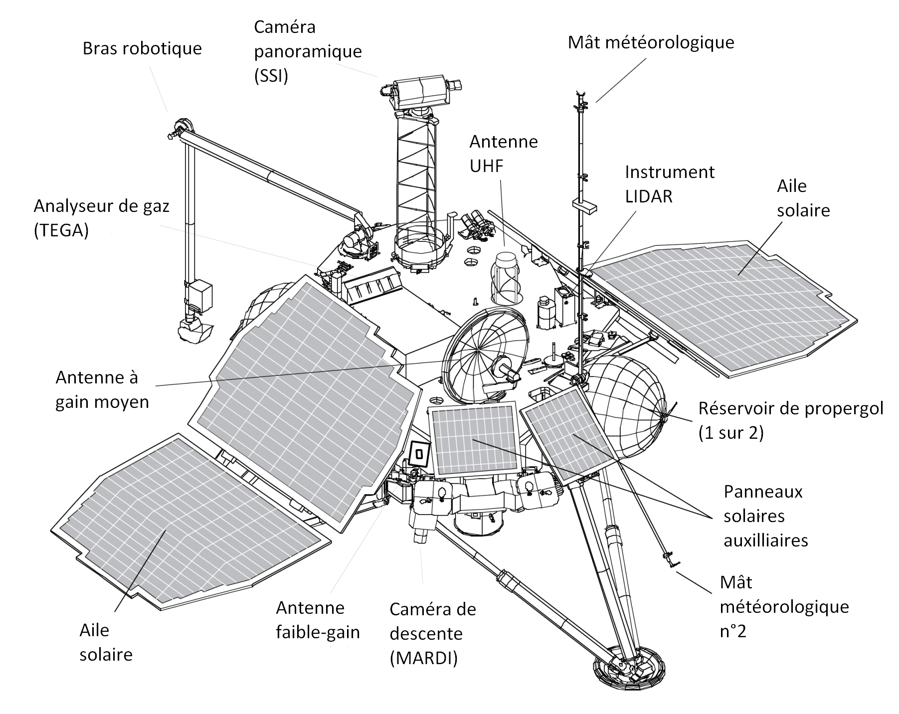 Diagramme de l'atterrisseur Mars Polar Lander